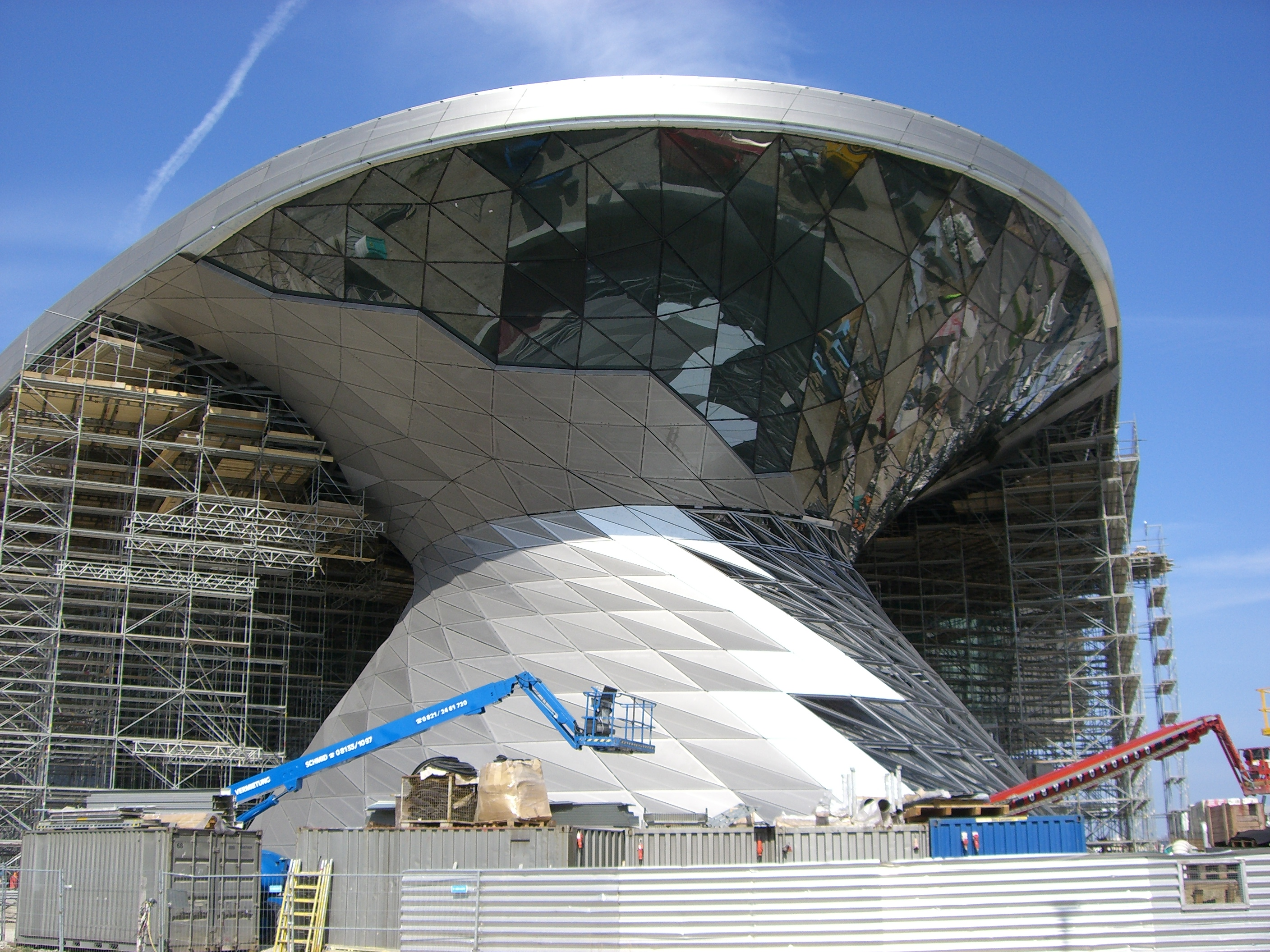 Die im Bau befindliche BMW Welt